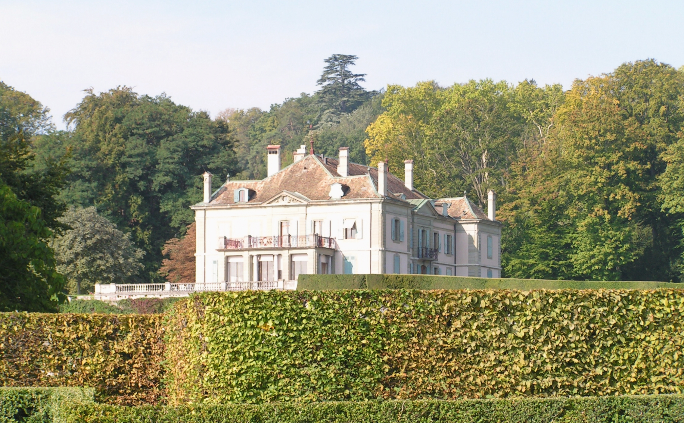 La Campagne du Reposoir à Pregny-Chambésy, dans la campagne genevoise.